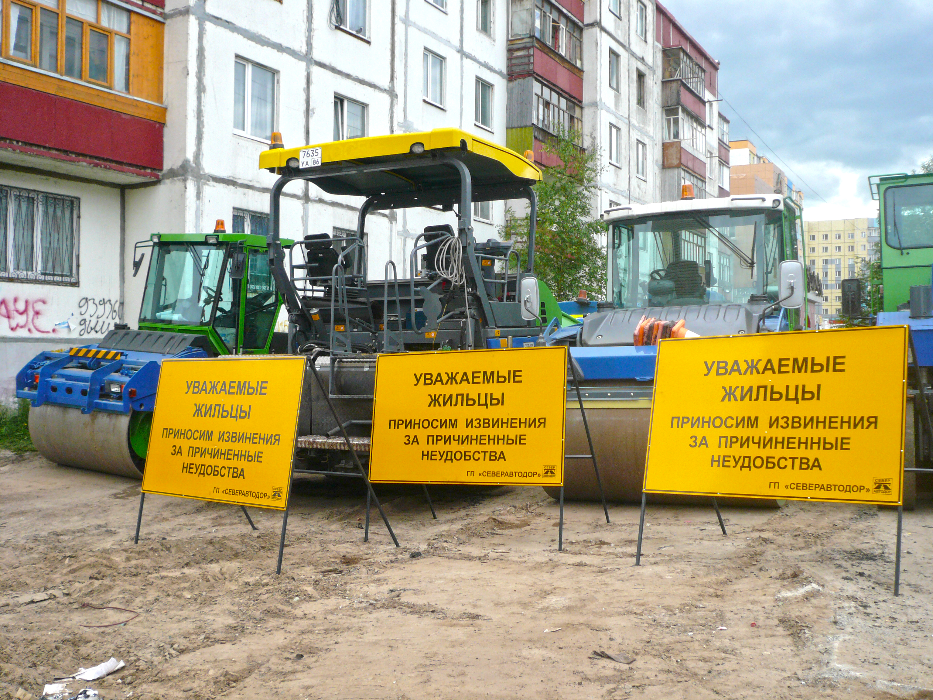 Ремонтные работы